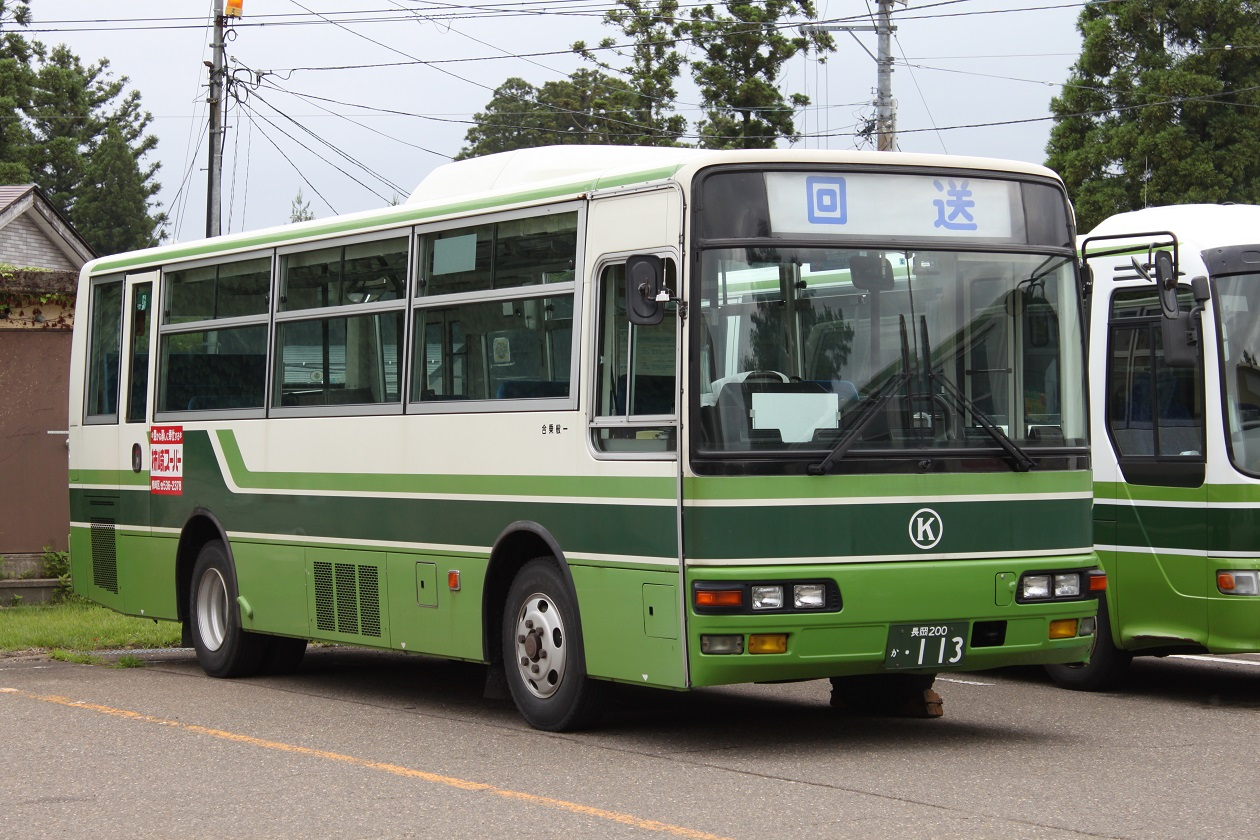 一般乗合車両は頸城自動車本体の旧貸切塗装を纏った車両が大半を占める